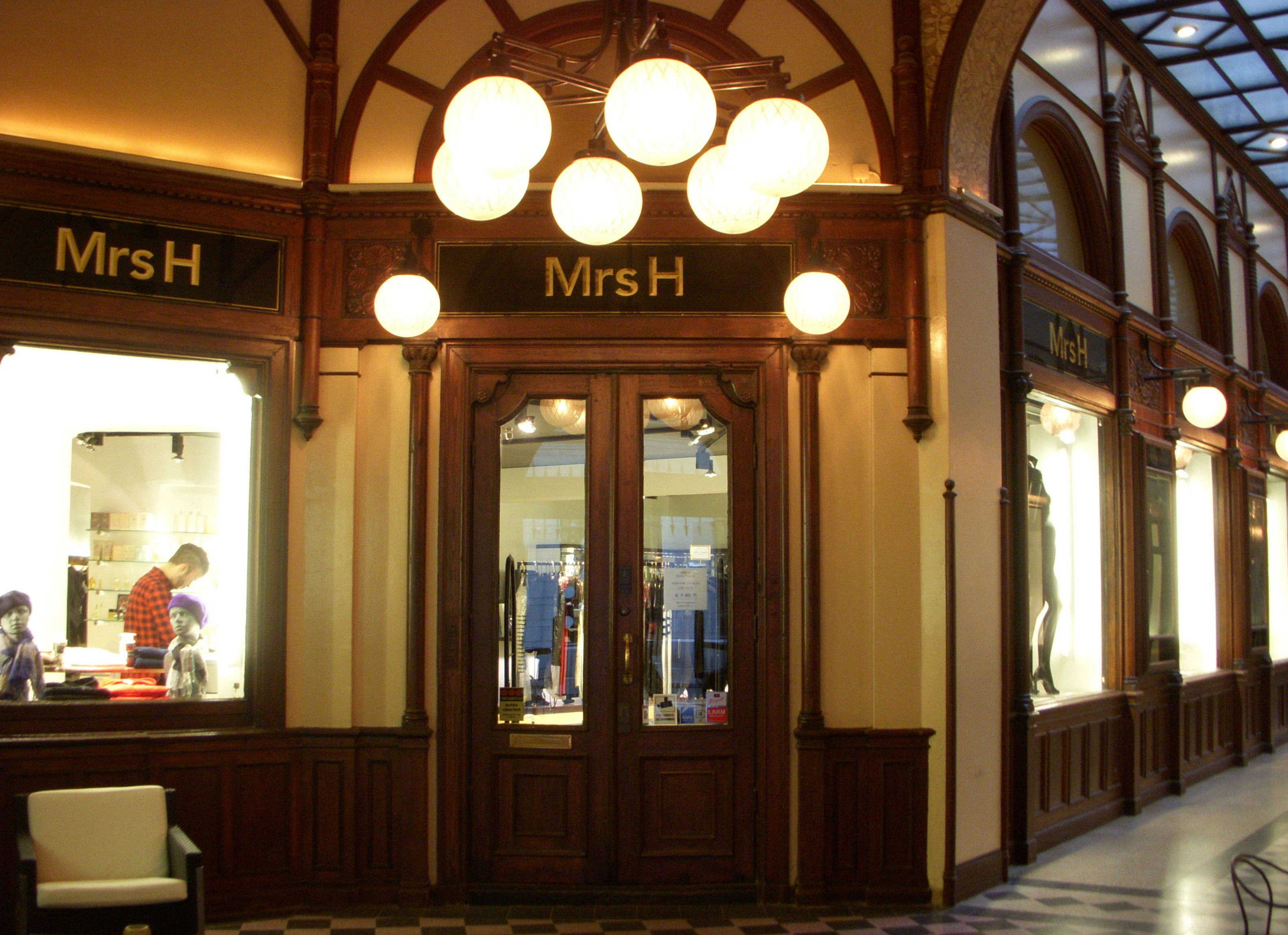 Före detta biografen "Maxims" entré i Birger Jarlspassagen i Stockholm